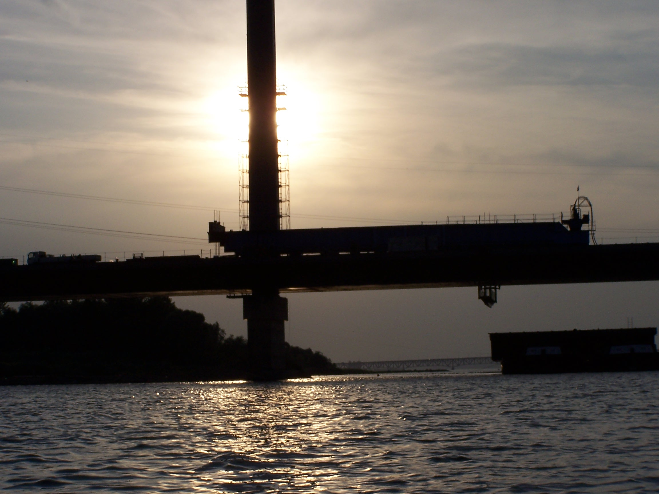 Budowa nowego mostu przez Wisłę.